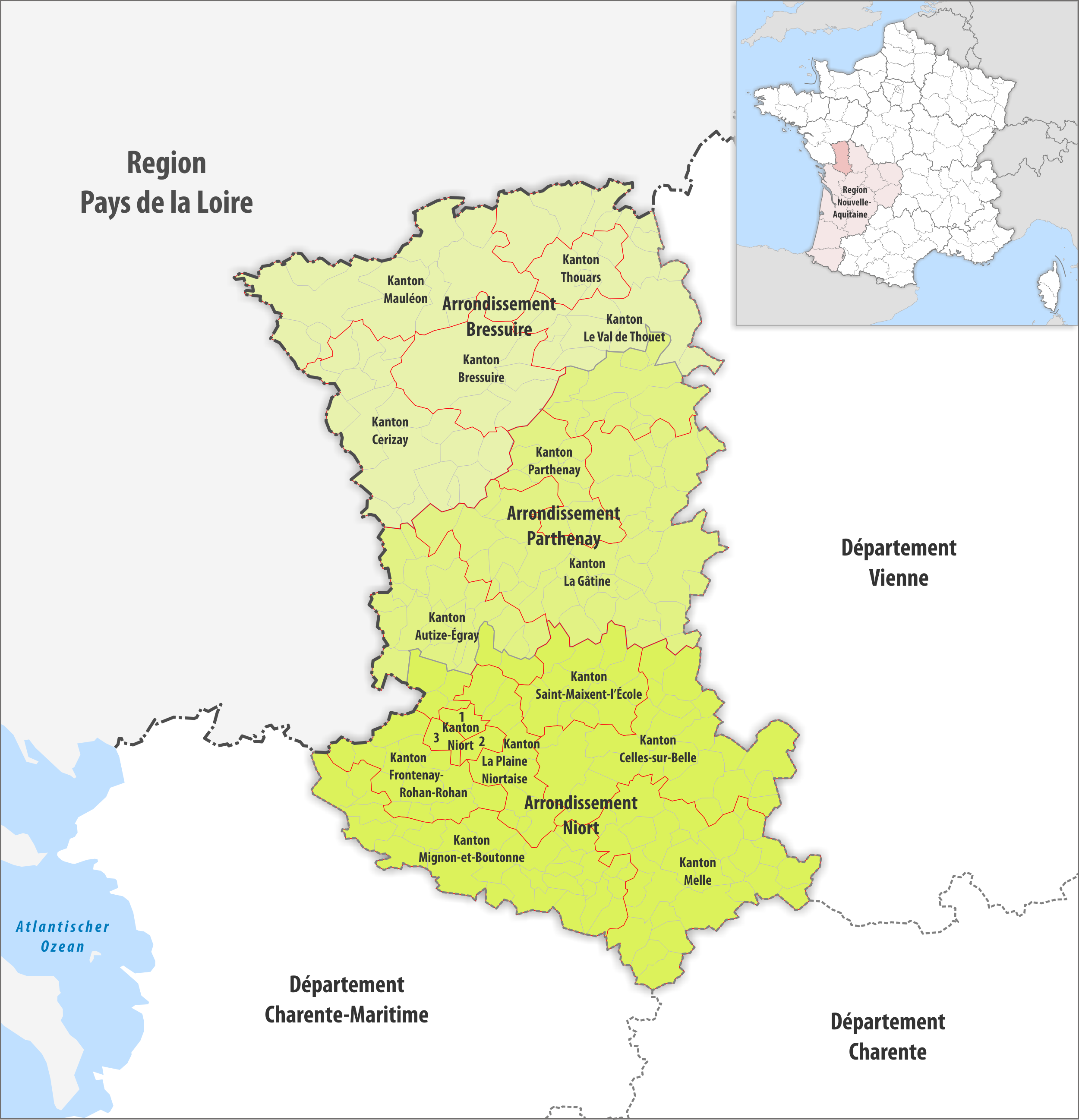 Gemeinden, Kantone und Arrondissemente im Departement Deux-Sèvres